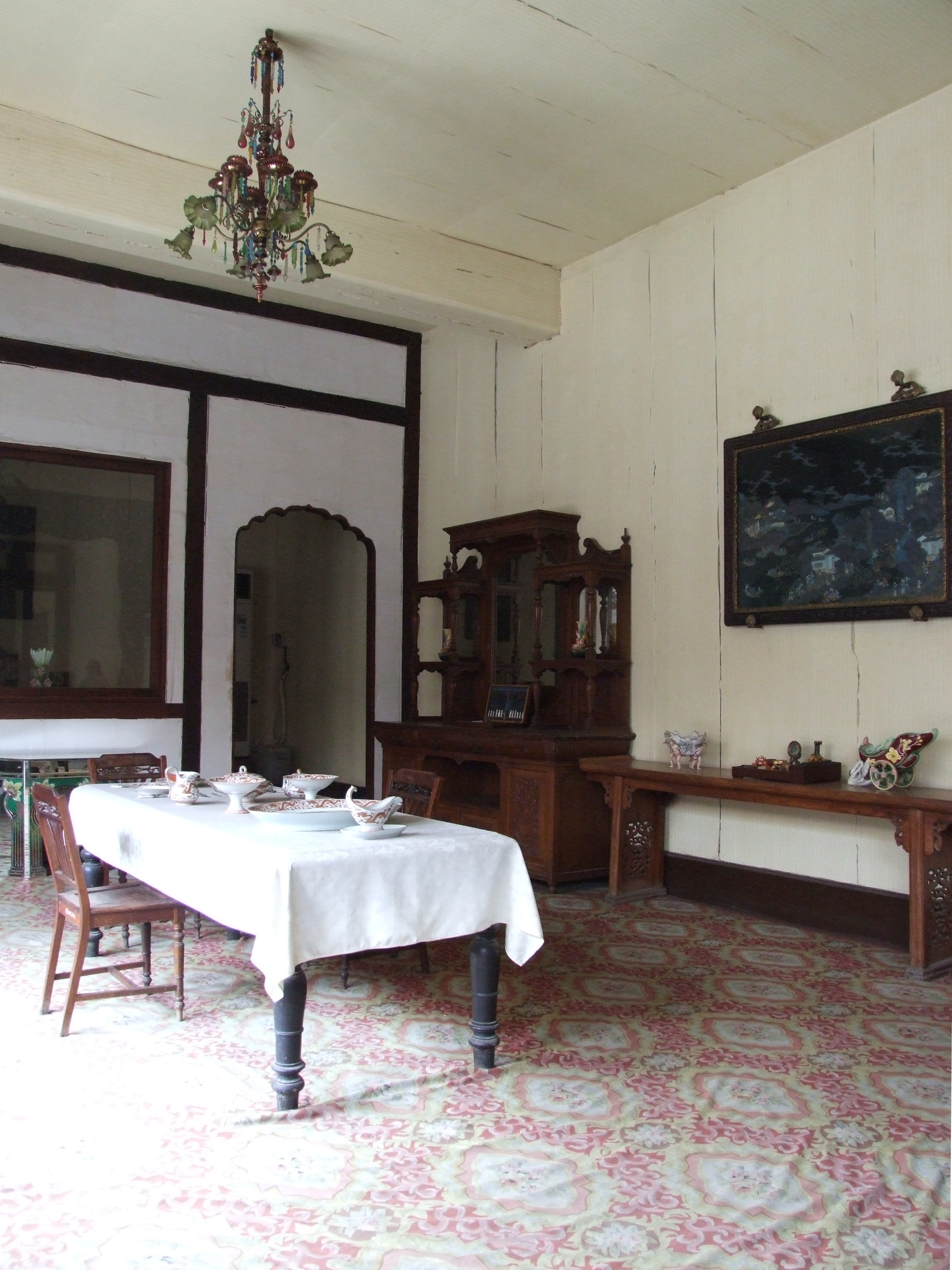 Verbotene Stadt